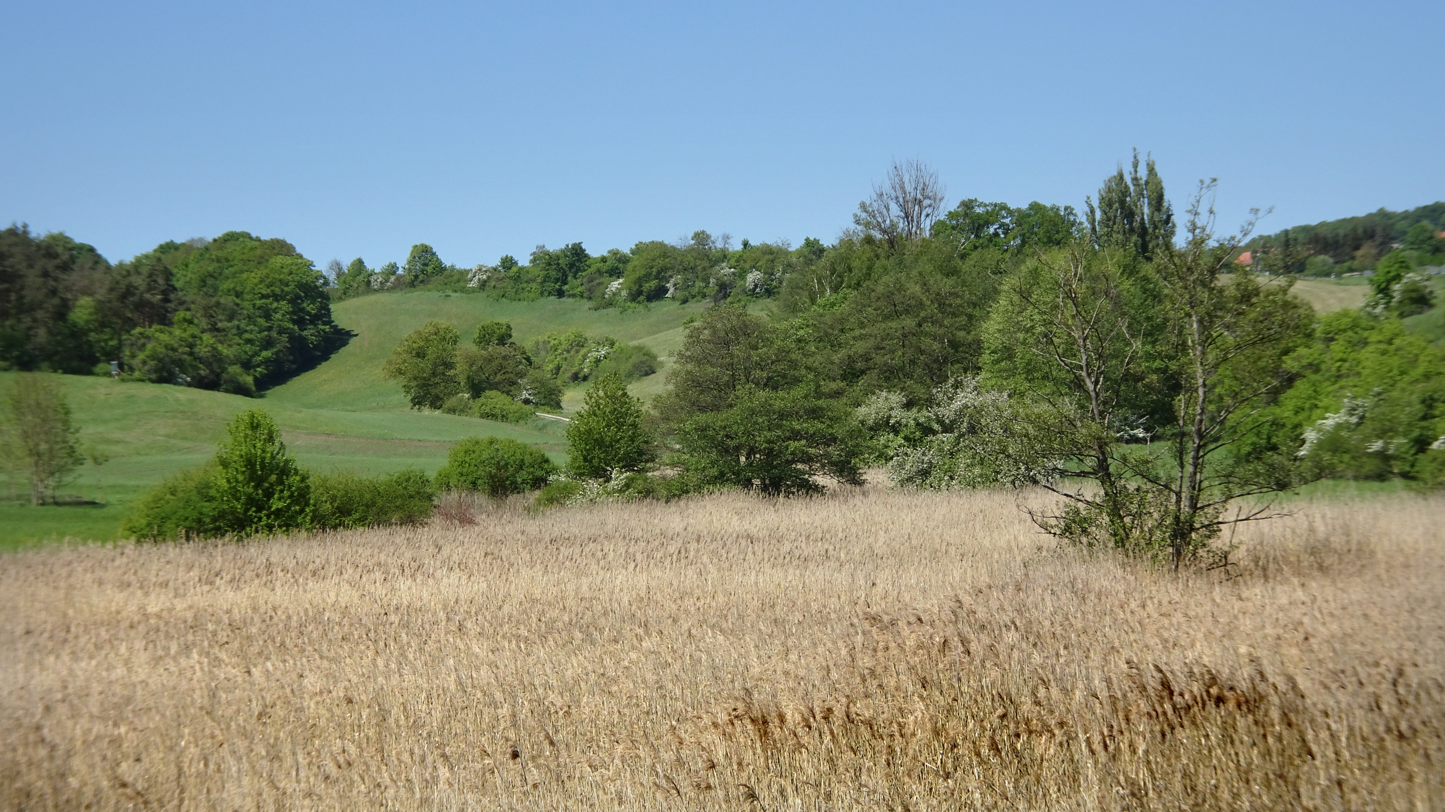 Das Naturschutzgebiet "Feuchtwiesen bei Lüderbach" liegt zwischen den Ringgauer Ortsteilen Rittmannshausen und Lüderbach im nordhessischen Werra-Meißner-Kreis, nahe der Landesgrenze zu Thüringen. Nordöstlich wird es von der Bundesstraße B 7 begrenzt. Geschützt werden der Feuchtbereich in der Tallage und die trockenen Waldbereiche am Weinberg. Der Bereich wurde in 1995 mit der nationalen Nummer 636027 und dem WDPA-ID-Code 163082 mit einer Fläche von 40,97 Hektar als Naturschutzgebiet ausgewiesen. Das Naturschutzgebiet wurde in 2008 in das insgesamt 185,04 Hektar große Fauna-Flora-Habitat-Gebiet "Wald südöstlich von Netra" Nr. 4926-304 integriert.